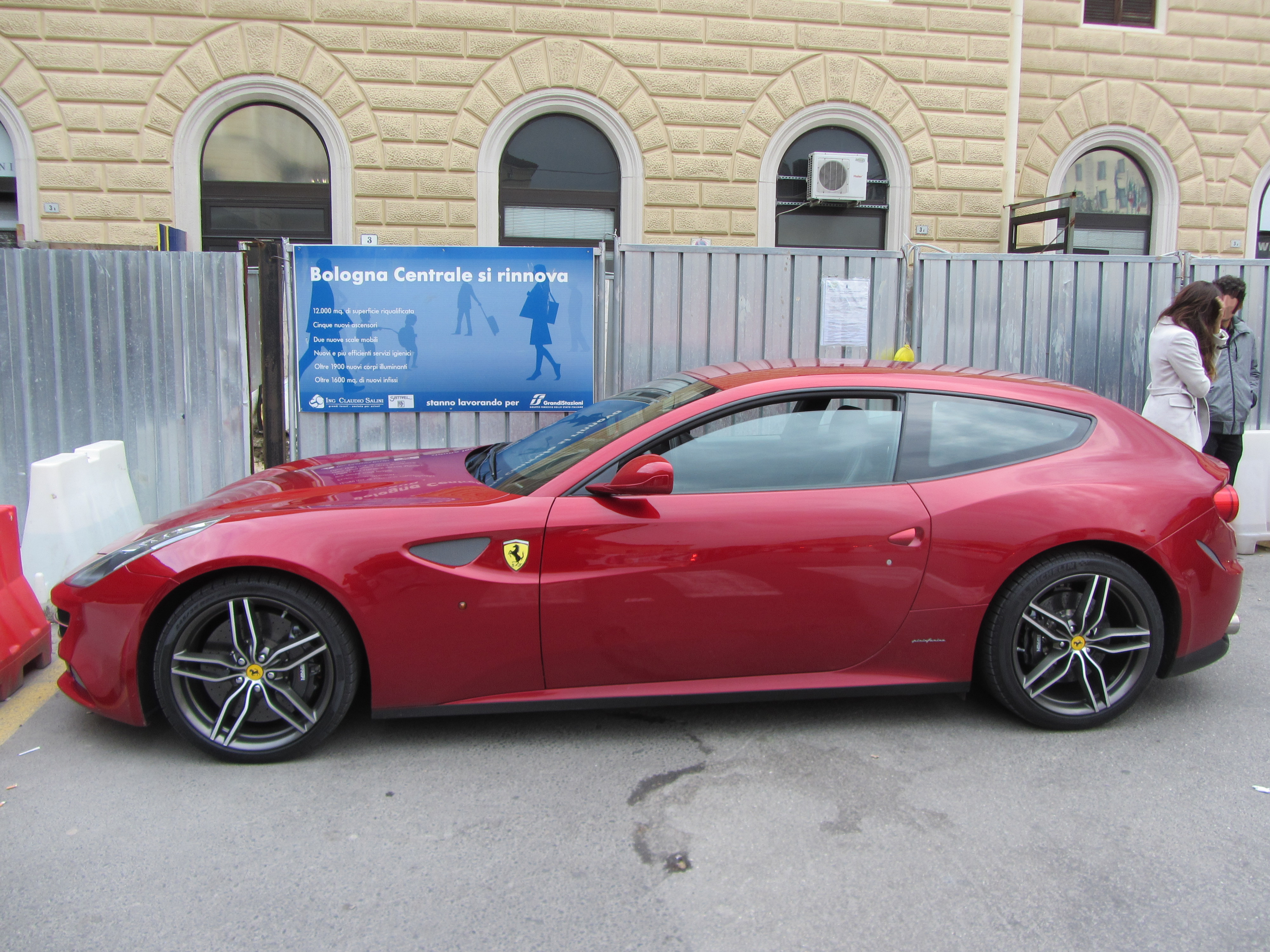 Vista laterale (profilo fiancata) di una Ferrari FF a Bologna